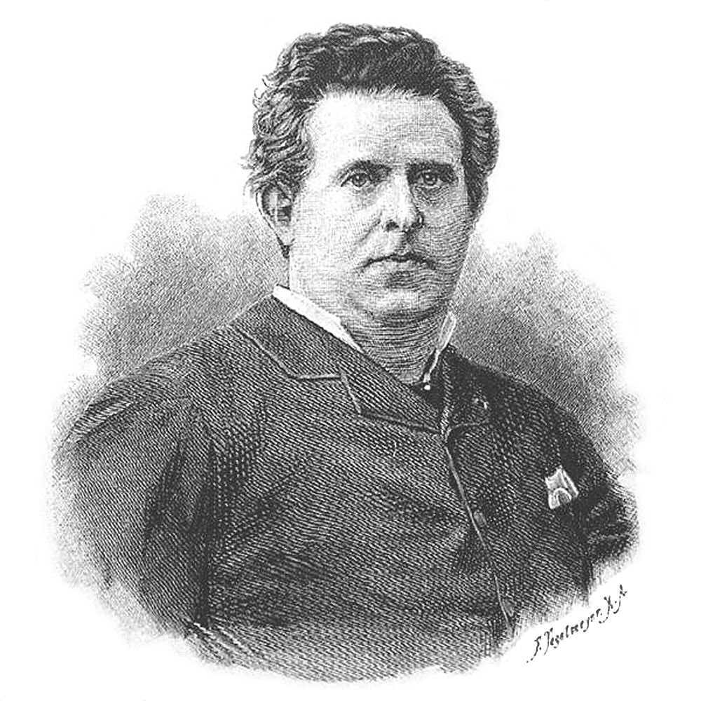 Ludwig Chronegk, Radierung von Ferdinand Tegelmeyer um 1860